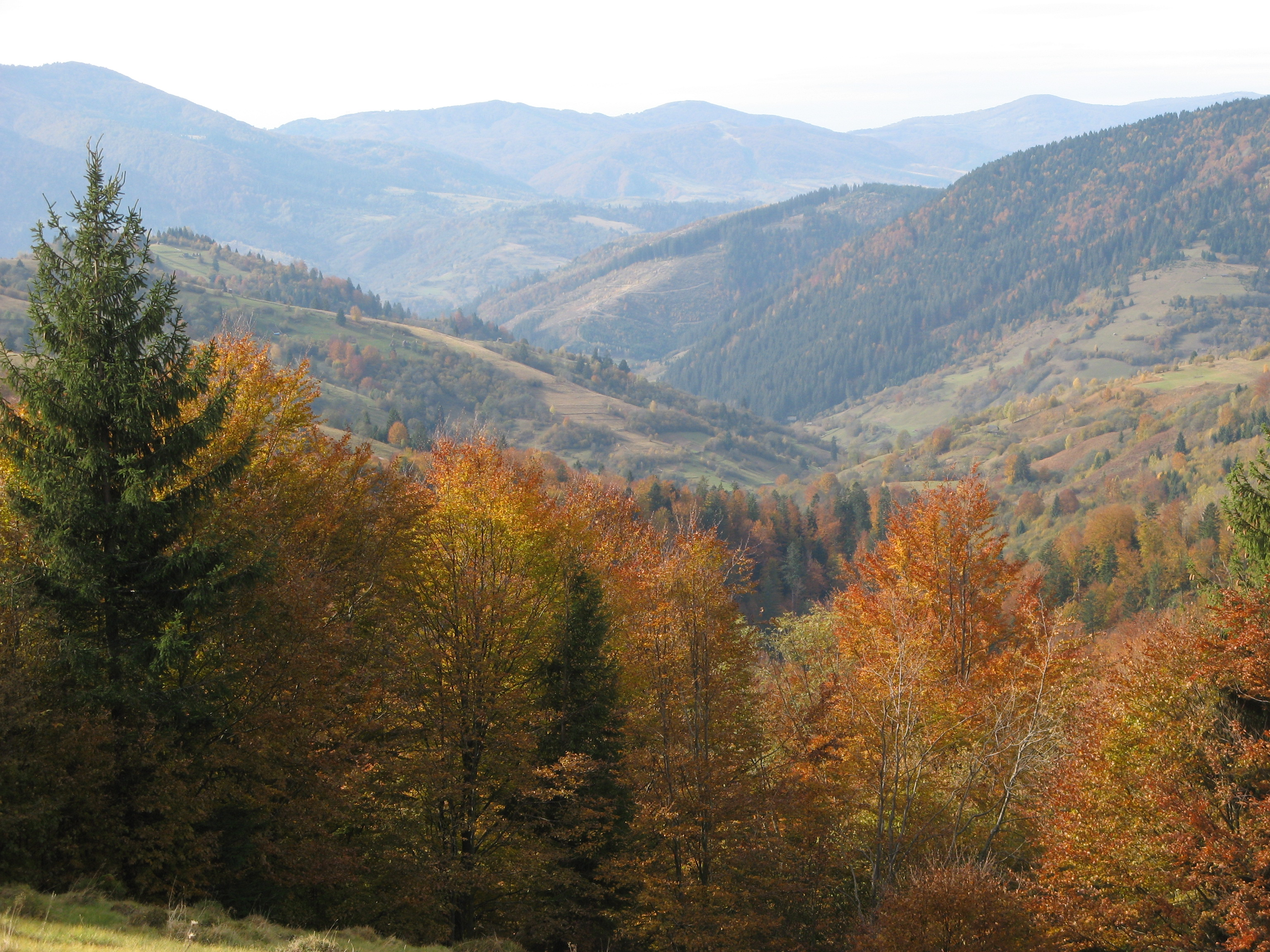 Синевирський перевал (793 м). Вигляд на долину смт Міжгір'я